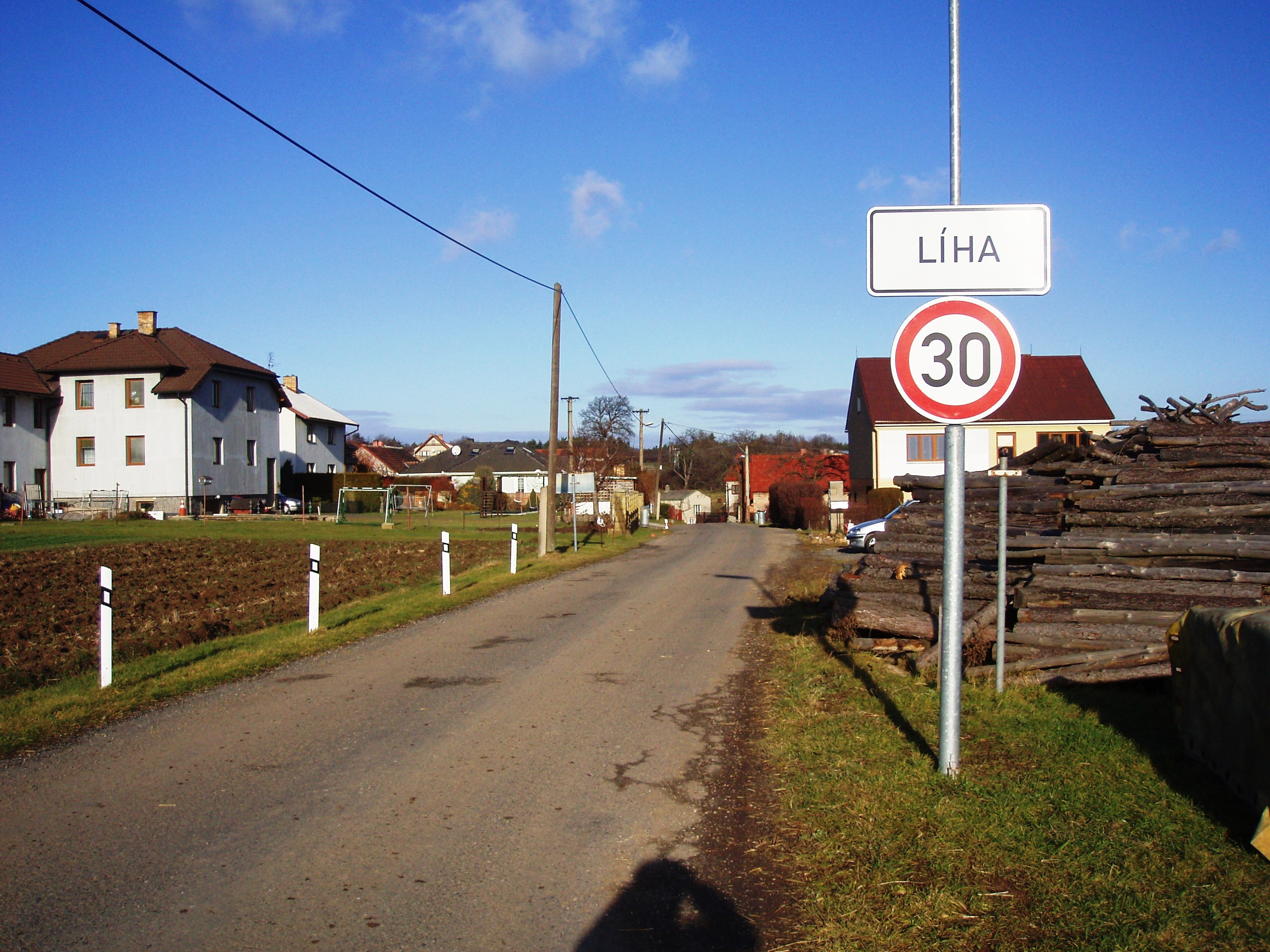 Líha - osada poblíž Suchodolu